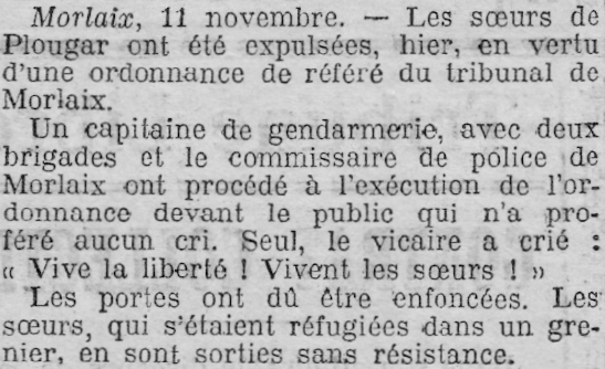 L'expulsion des Sœurs de l'école de Plougar le 10 novembre 1906 (journal La Lanterne du 11 novembre 1906) ; à noter que le récit de la réaction de la population diffère quelque peu dans ce journal favorable à la laïcité de celle fournie par le journal La Croix.